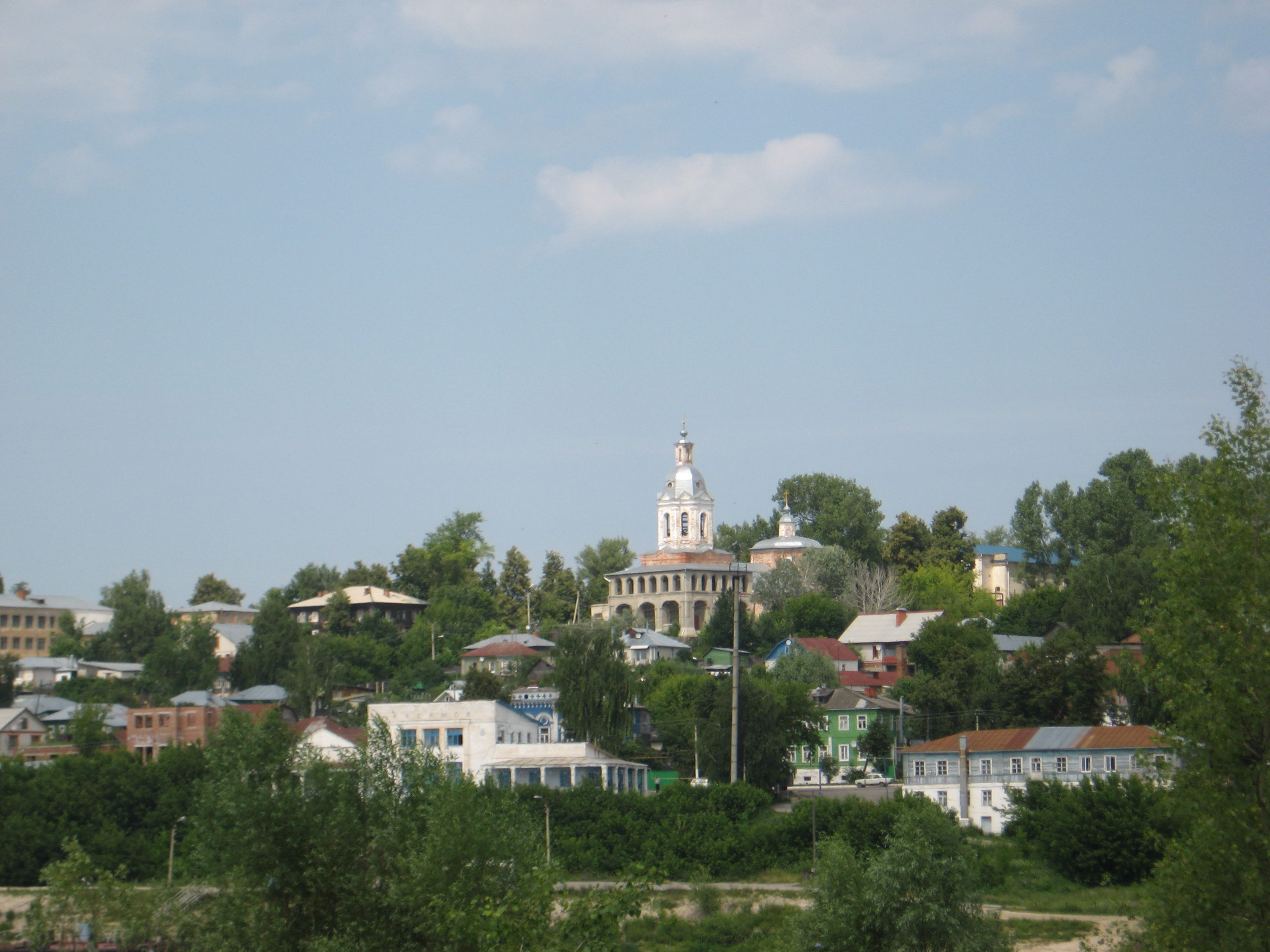 Вид на набережную г.Касимова с противоположного берега